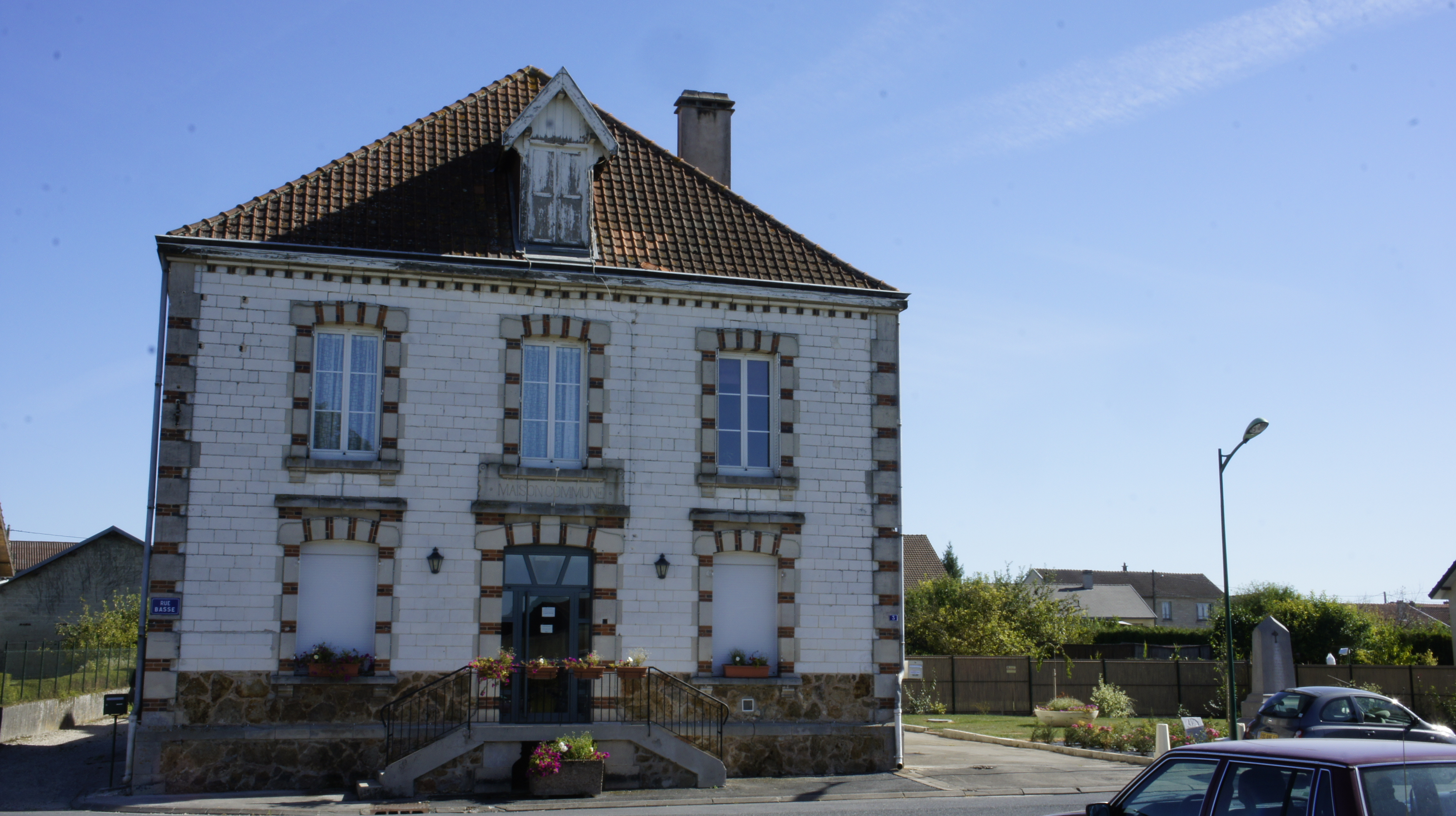 Vue de la mairie de Thibie.